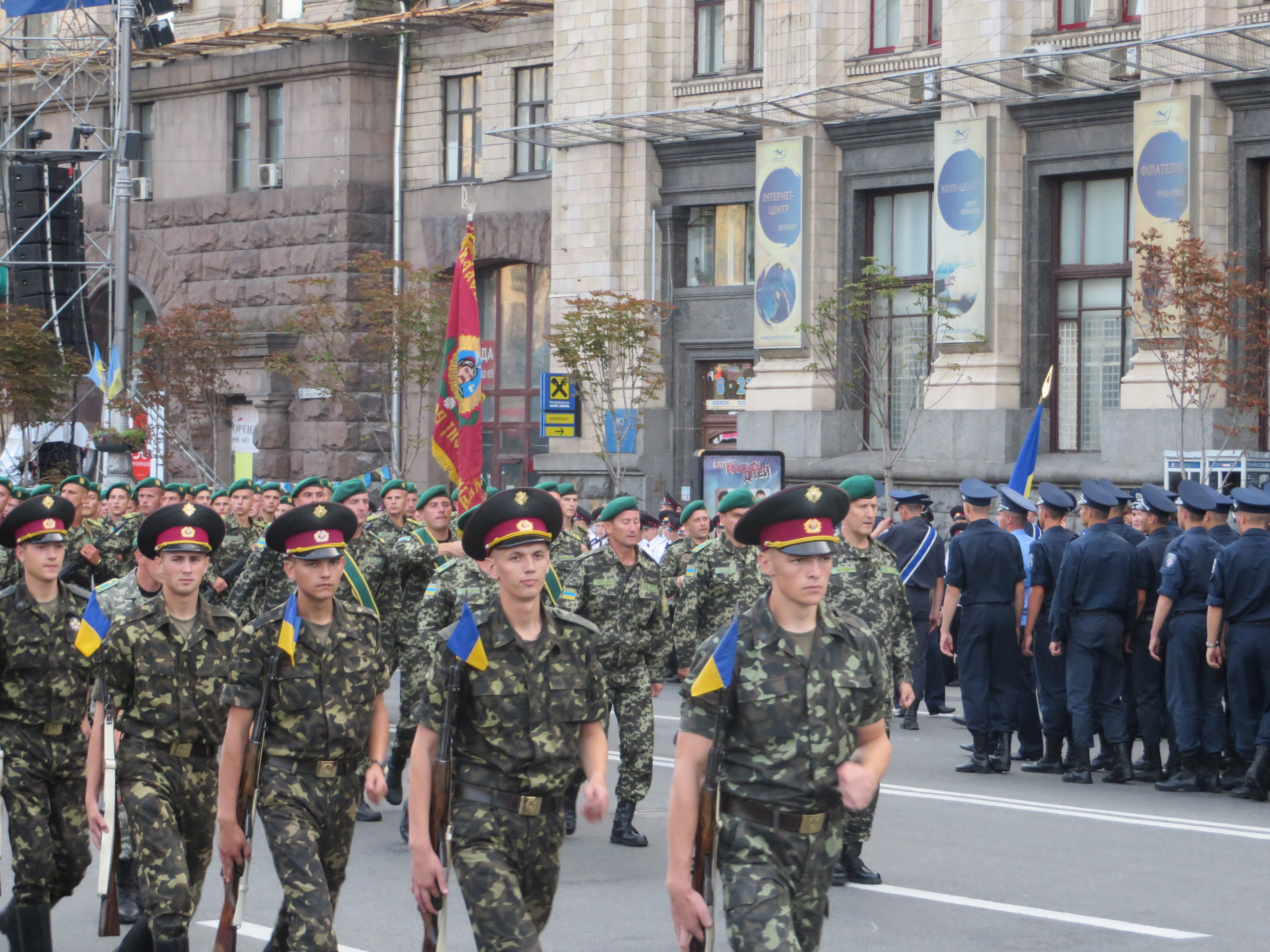 Солдати на тренуванні до Параду 2014 22 серпня 2014 року